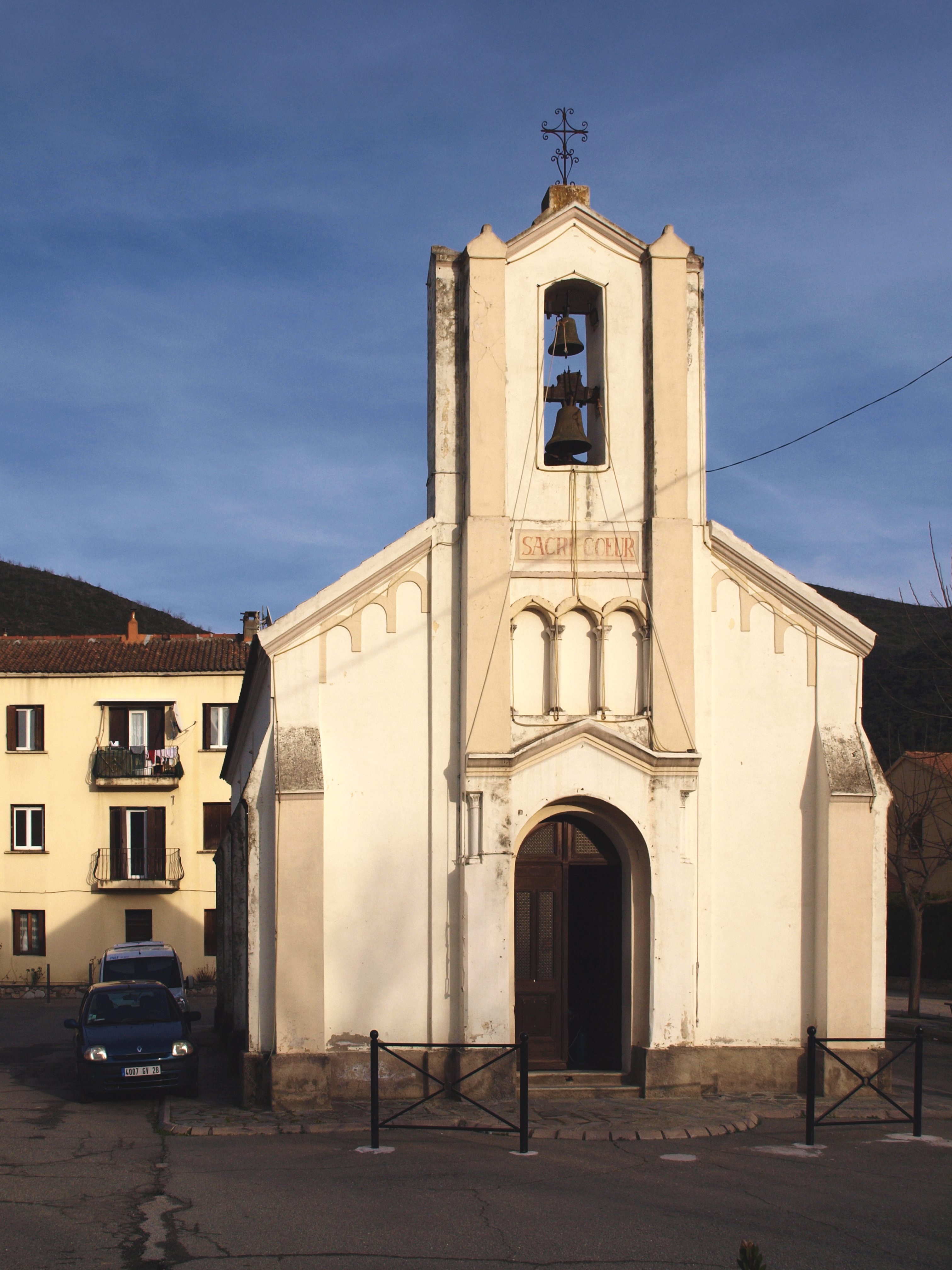 Morosaglia (Corsica) - Chapelle du Sacré-Cœur à Ponte-Leccia